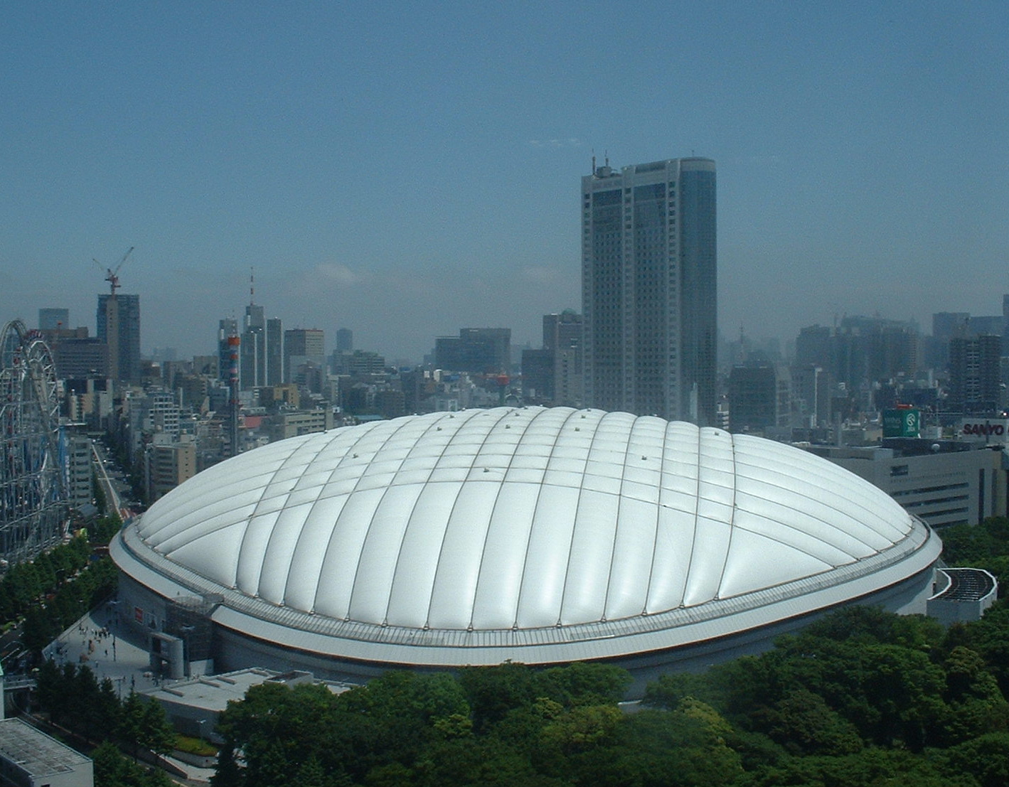 投稿者が2006年5月に現地訪問し、撮影（中央大学の後楽園キャンパスの校舎から許可を得て撮影） 2006年8月13日 (日) 16:05 . . Carpkazu . . 1419×1107 (518,105 バイト)